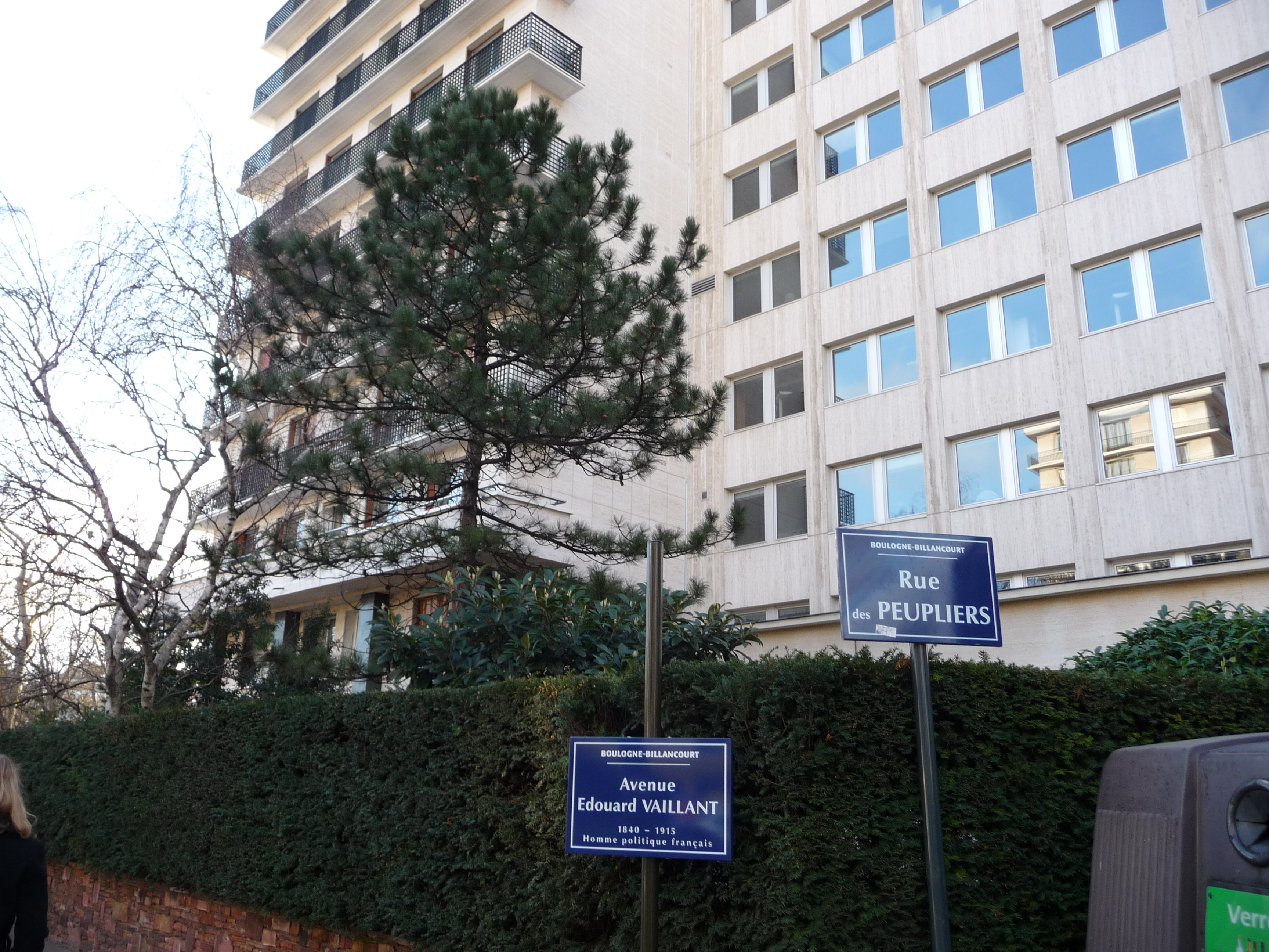 Boulogne Billancourt - Angle Avenue Edouard Vaillant et rue des Peupliers